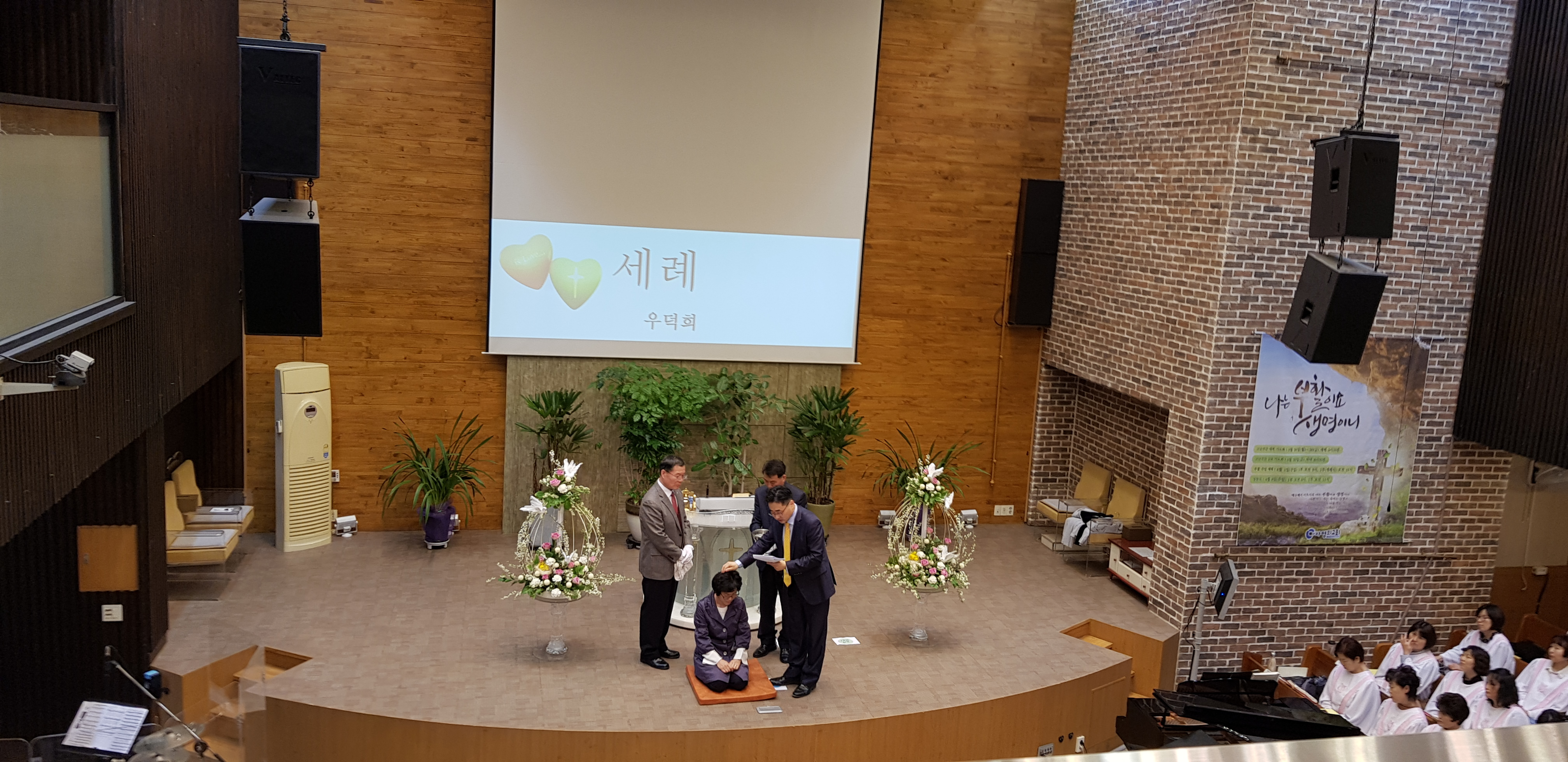 교회의 세례식 수원 사명의 교회